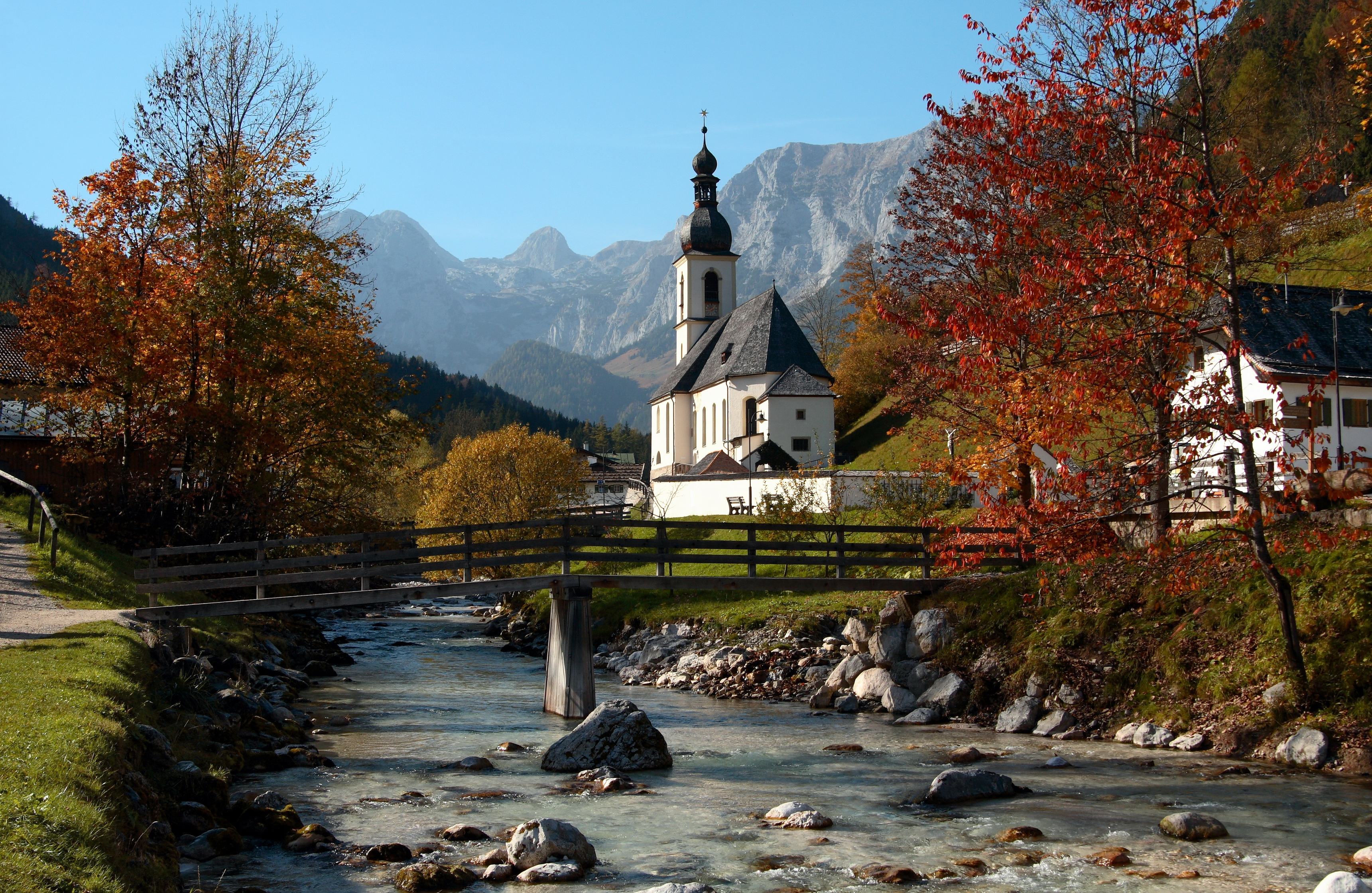 Pfarrkirche St. Sebastian in Ramsau bei Berchtesgaden vom Malerwinkel aus mit Reiteralpe; turned, traffic-signs/busplate removed.